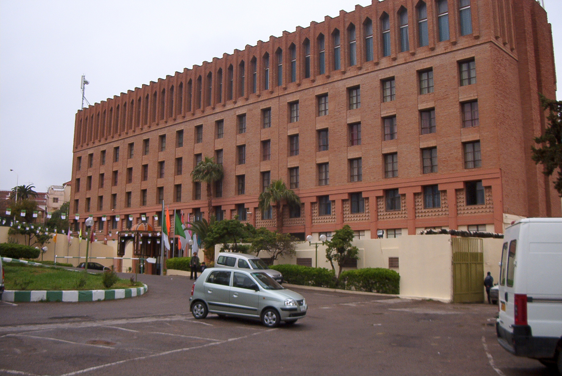 Hotel Zianides à Tlemcen